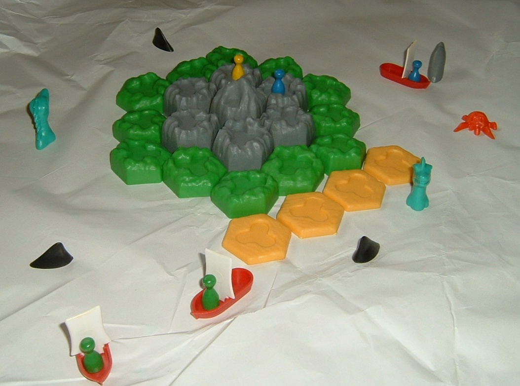 Zubehör (Auswahl) zum Brettspiel Atlantis